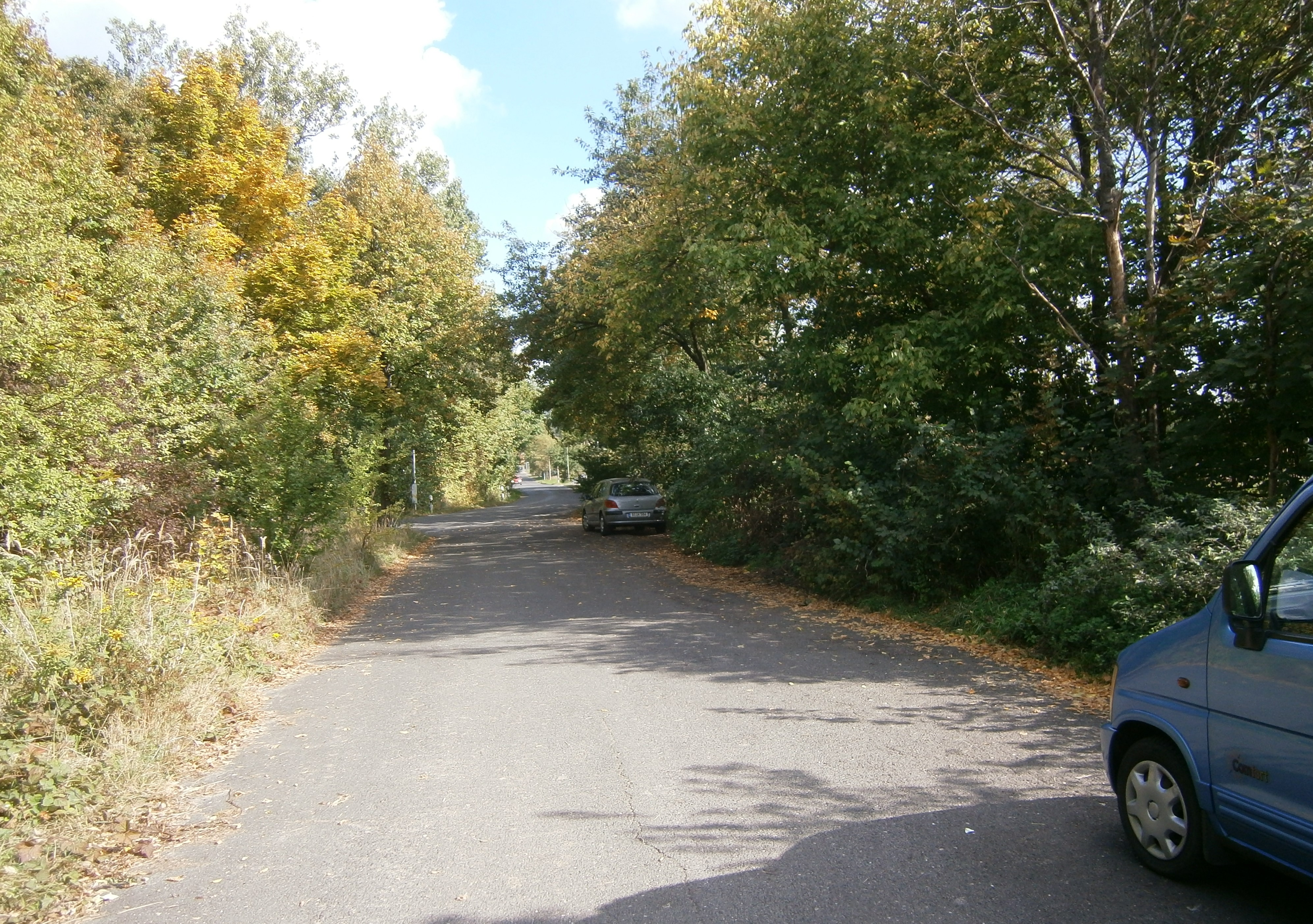 Die Bahnhofstraße ist eine Straße in Berlin-Blankenfelde. Sie liegt in der Trasse der Bernauer Heerstraße. Durch den Mauerbau wurde der Lauf der Heerstraße (als Wittenauer Straße) wurde der Straßenlauf zwischen Ost- ud West-Berlin unterbrochen. Heute ist im Osten nur noch eine Wendeschleife auf der direkten Verbindung vorhanden.